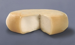 Queso de Oscos